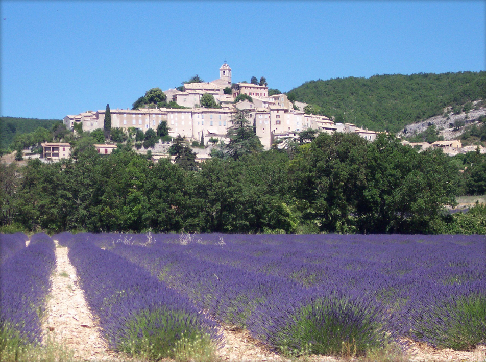 champs de lavande au pied du village de Banon